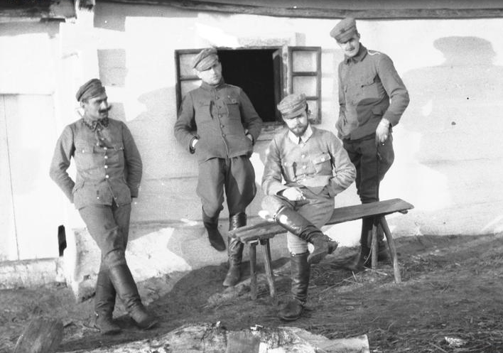 Polish Legionists: Felicjan Sławoj Składkowski, major Michał Żymierski (sitting)and lieutenant Bratro.